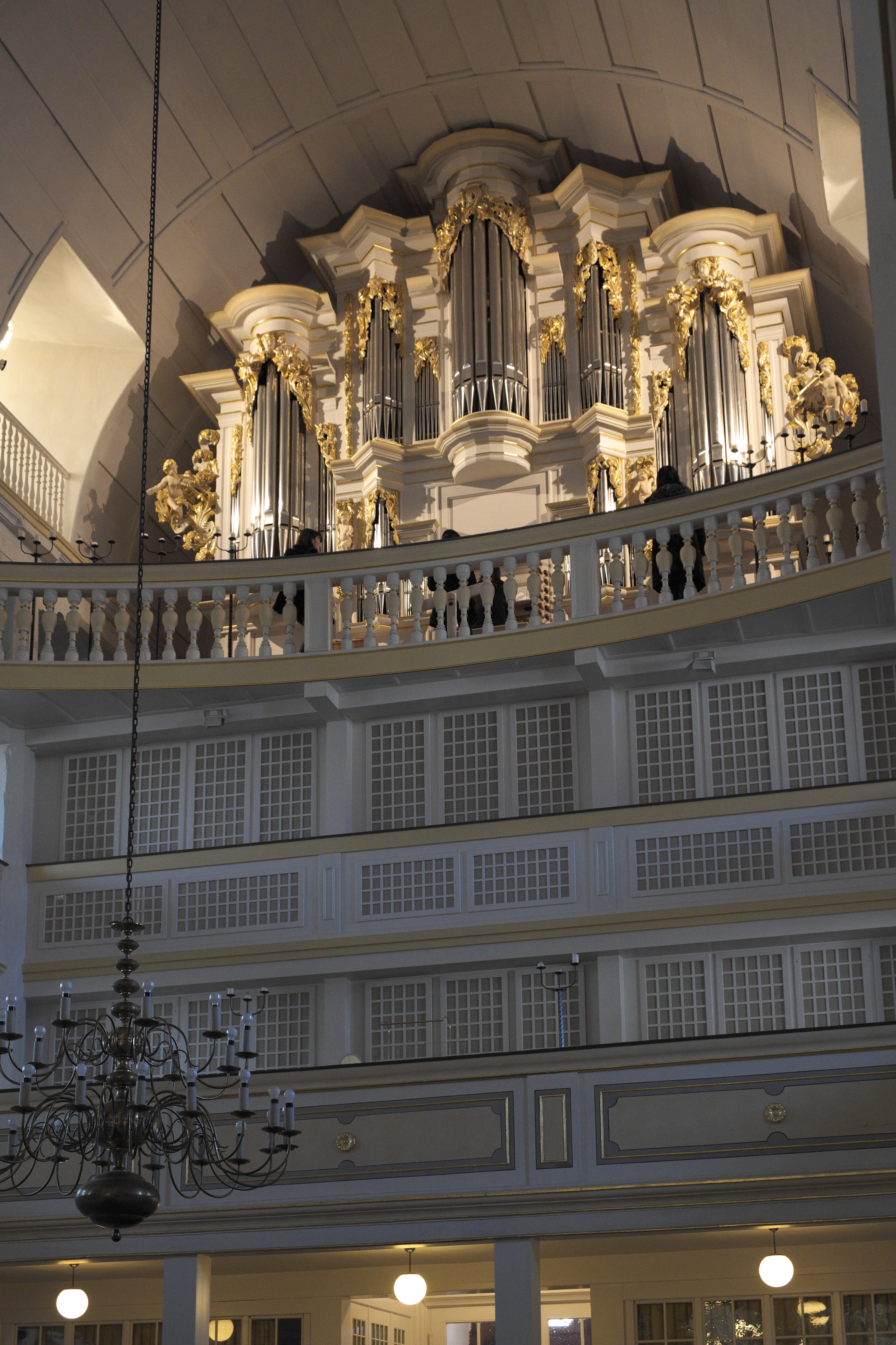 Bachkirche in Arnstadt im Ilmkreis in Thüringen/Deutschland, Orgel